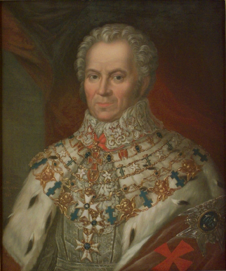 Porträtt av Mathias Rosenblad (1758-1847) iklädd riksrådsdräkt med riksrådsmantel. Runt halsen bär han ordenskedjorna för Serfimerorden, Svärdsorden, Nordstjärneorden samt Vasaorden. Runt halsen bär han Carl XIII:s orden. På manteln syns kraschan för Serafimerorden samt Carl XIII:s orden. Målning från ca 1830 av Carl Wilhelm Nordgren.